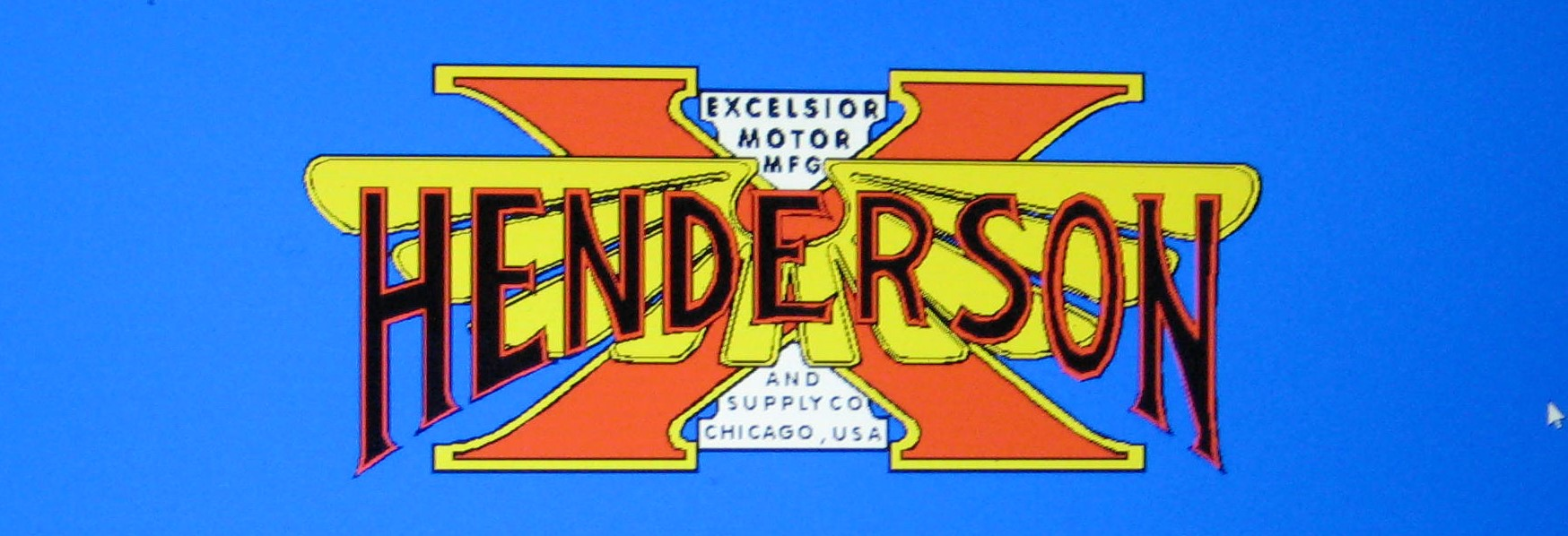 Skjermdump av tankdekal Henderson